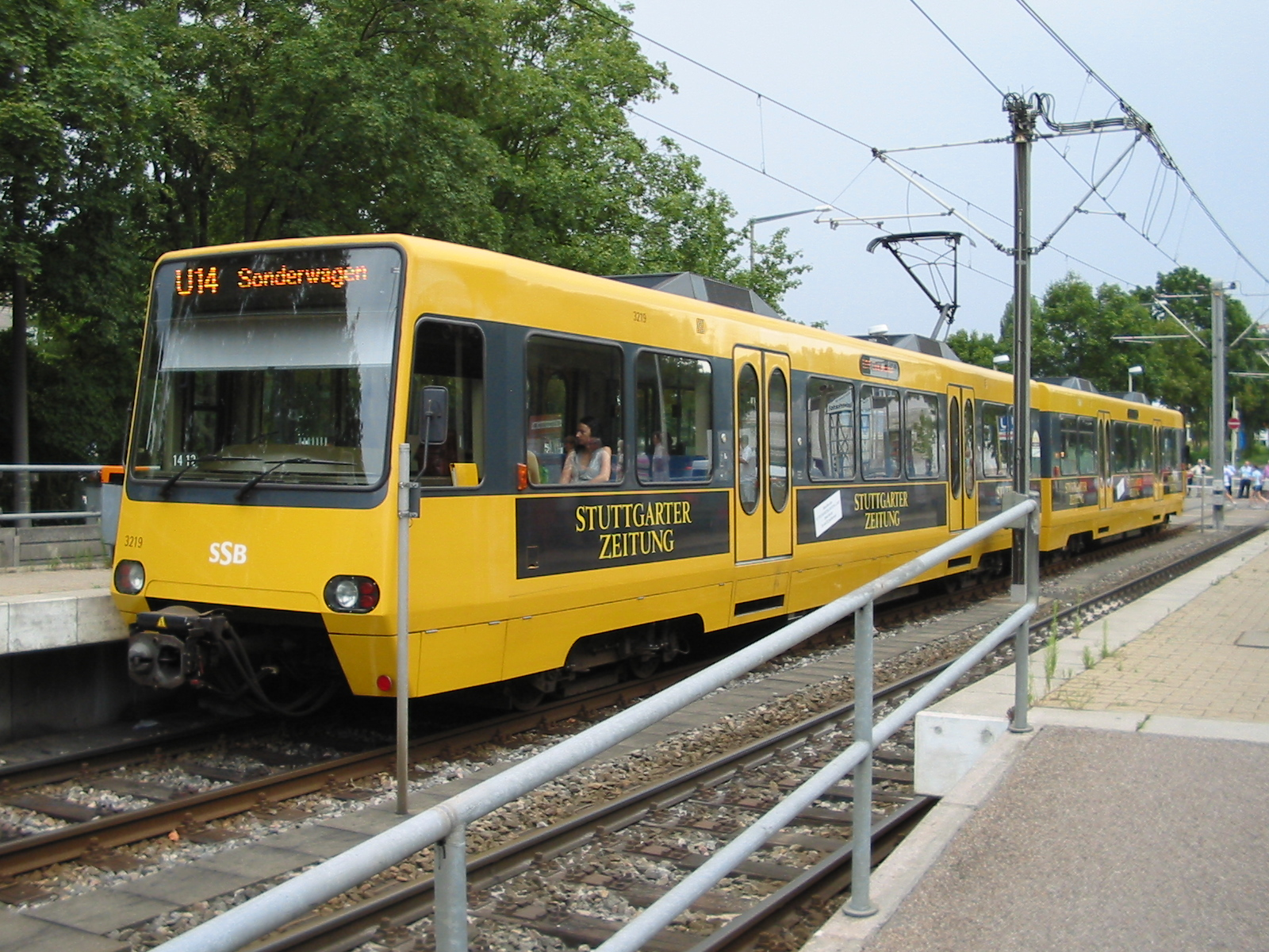 Stadtbahn Stuttgart: U14-Sonderwagen an der Haltestelle Auwiesen (23.07.2006, 10:32) eigenes Foto / alle Rechte freigegeben